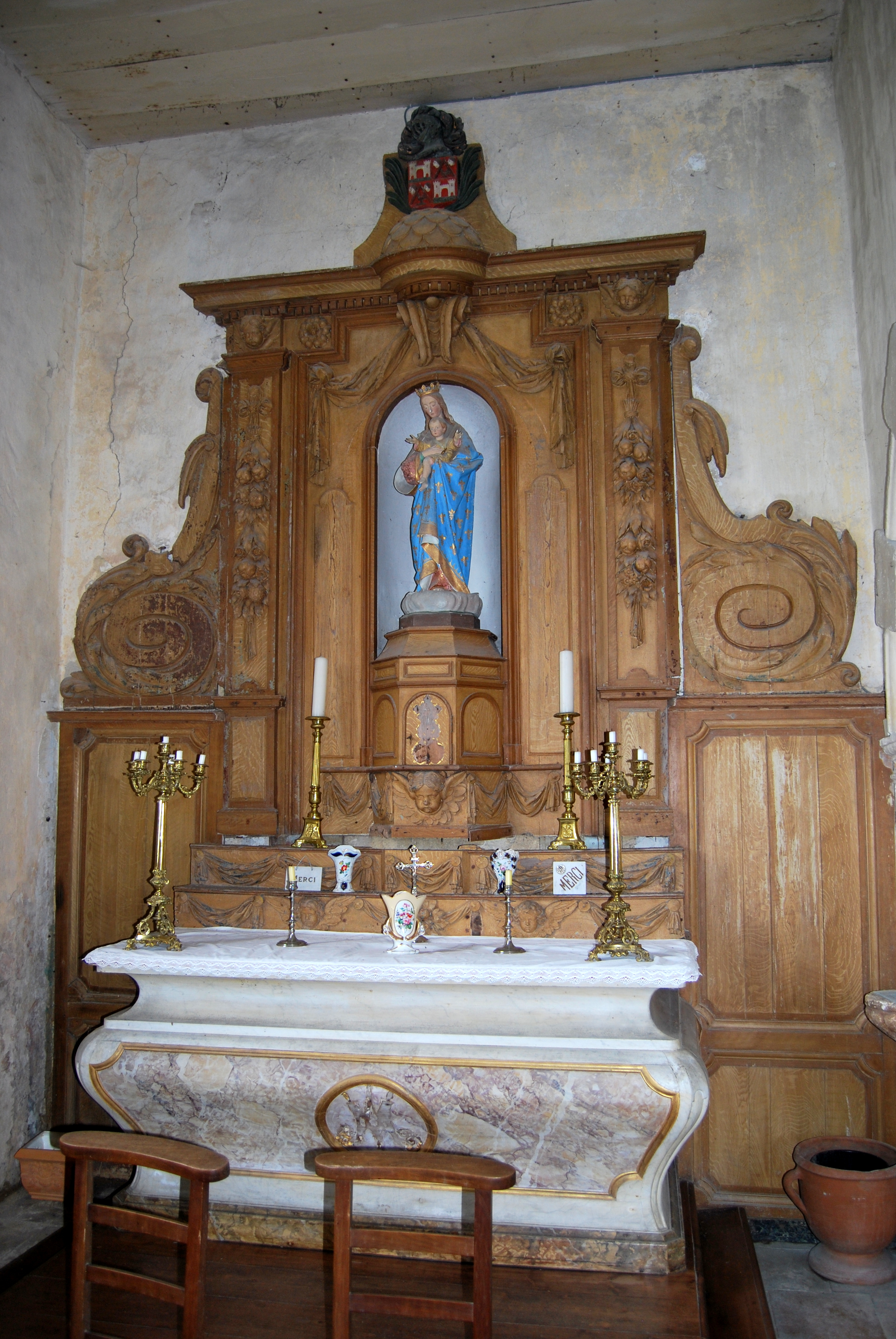 Église Saint-Jean-Baptiste de Cameyrac .